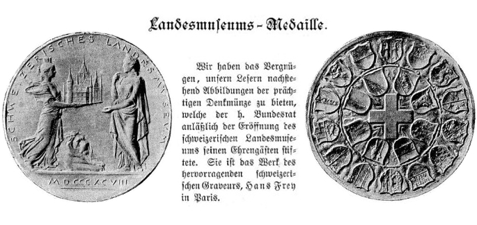 1898. Gedenk Medaille für das Landesmuseum Zürich. Von Hans Frei (1868–1947), Graveur, Medailleur und Bildhauer